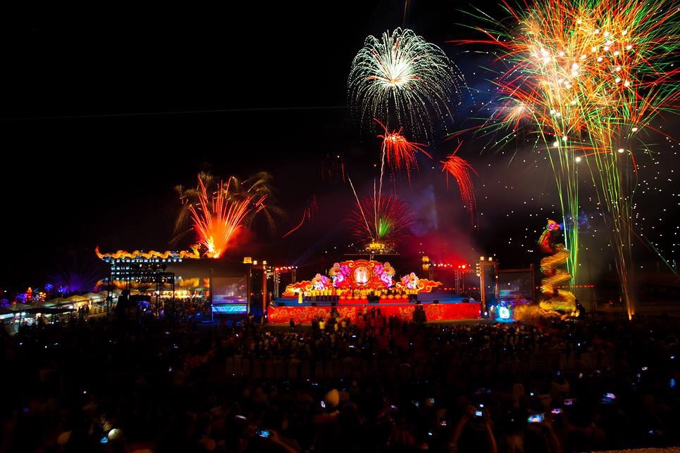 ตรุษจีนนครสวรรค์